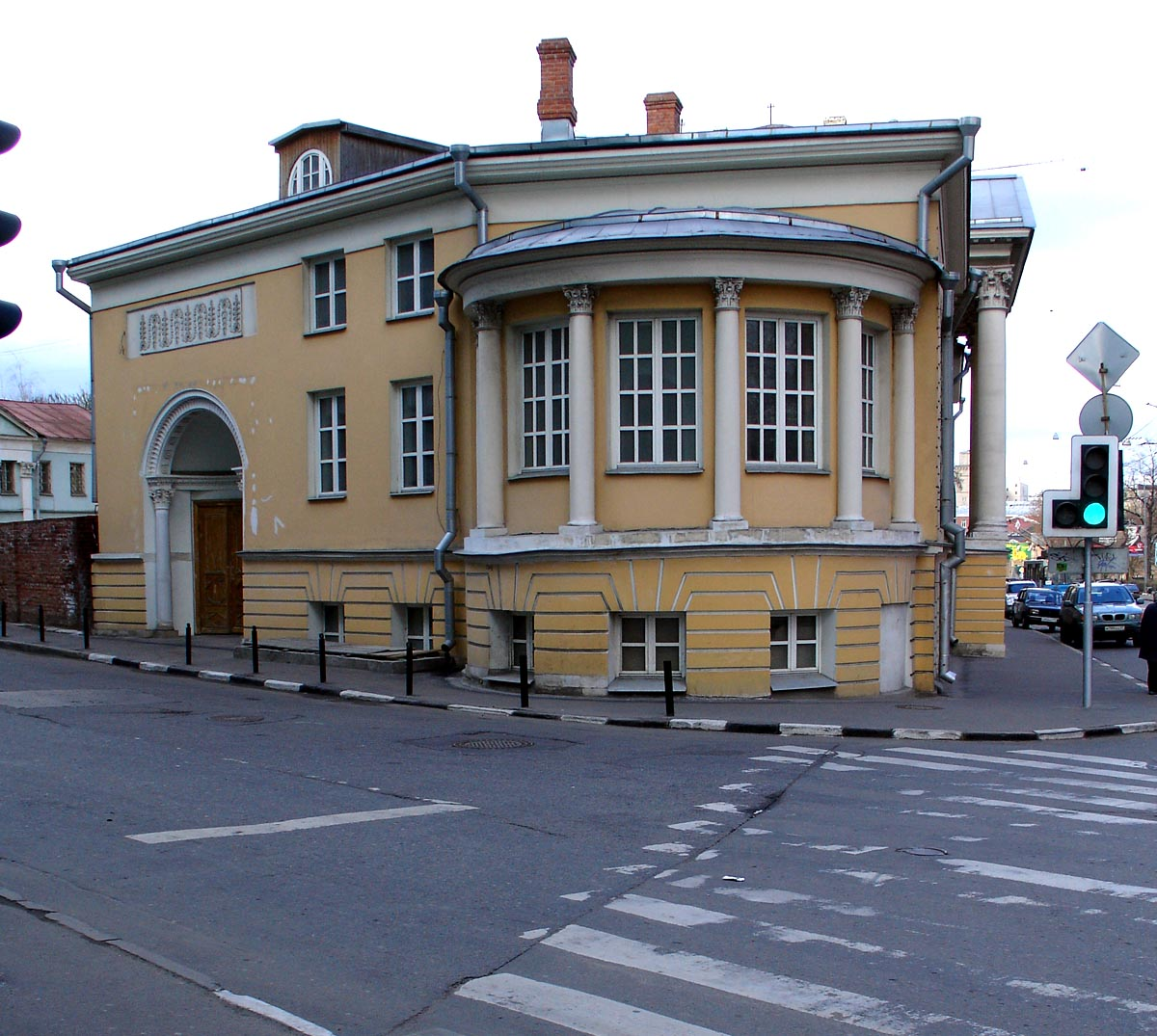 23 Staraya Basmannaya Street, Basmanny District, Moscow, Russia (1820s).Дом Муравьёва-Апостола, Москва, Старая Басманная, 23